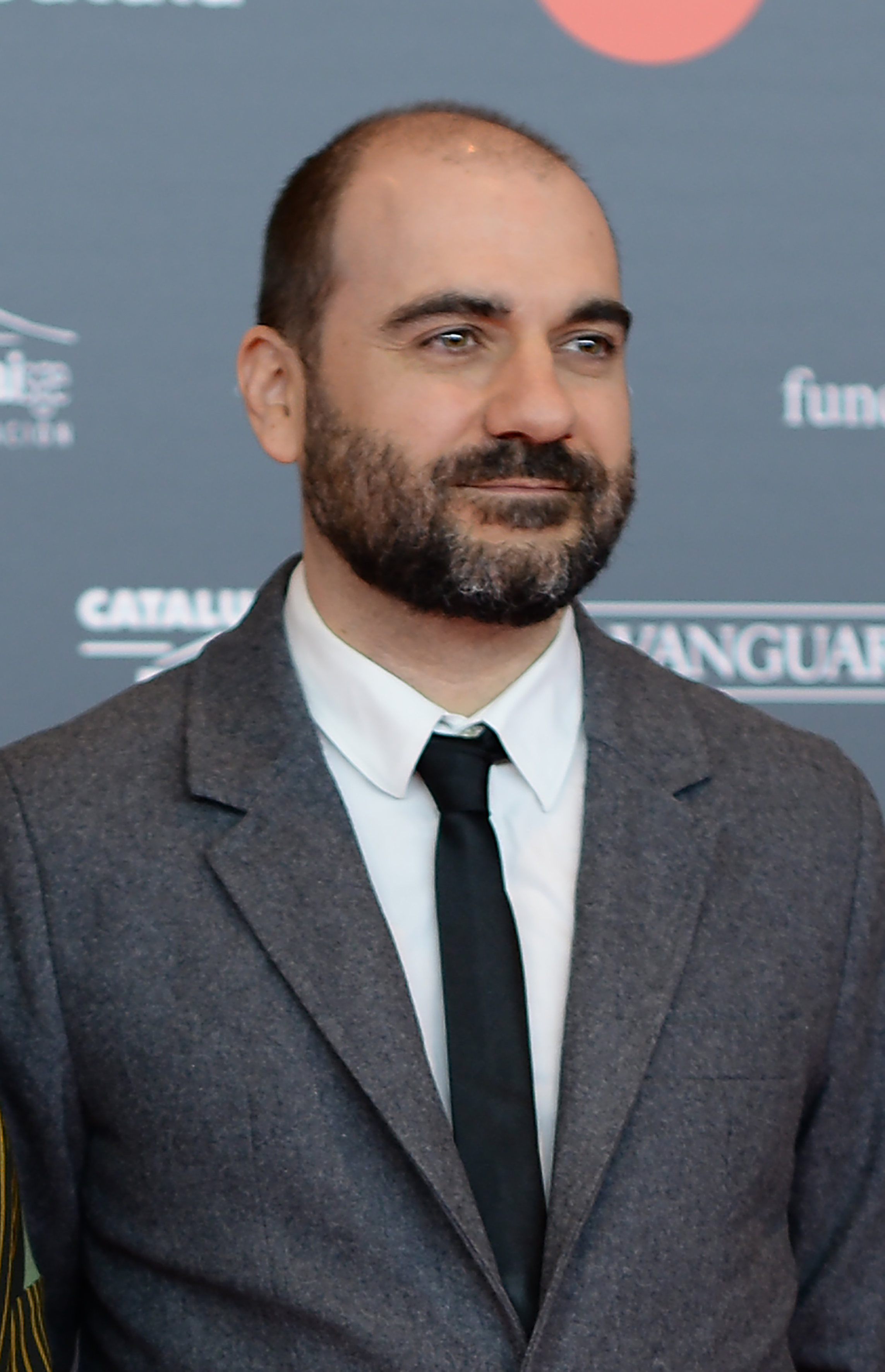 Àlex Villagrasa, director de cinema, XII Premis Gaudí (2020)